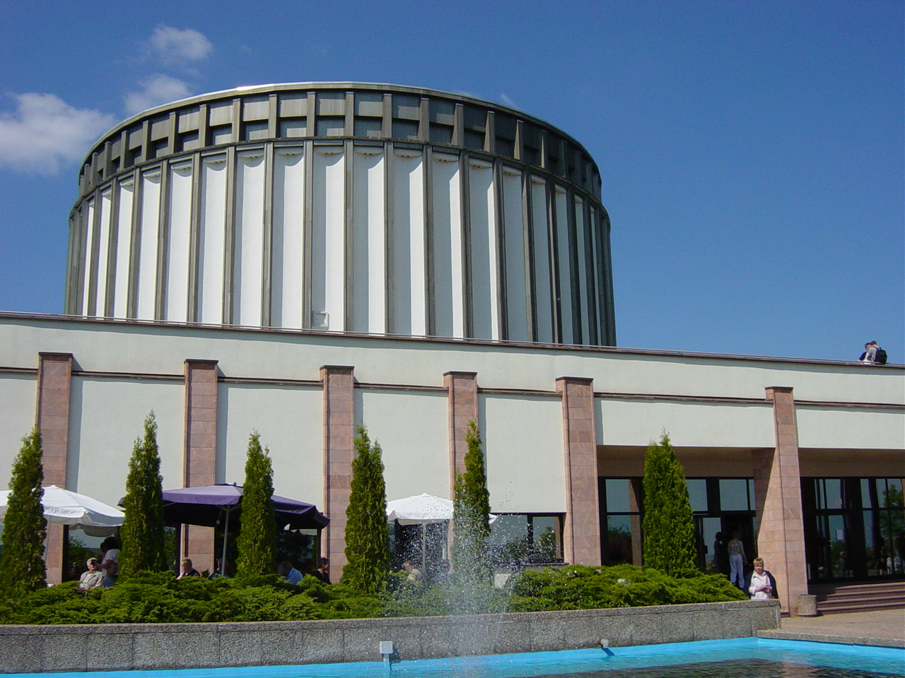 Gebäude des Bauernkriegspanoramas in Bad Frankenhausen/Kyffhäuser (Thüringen)